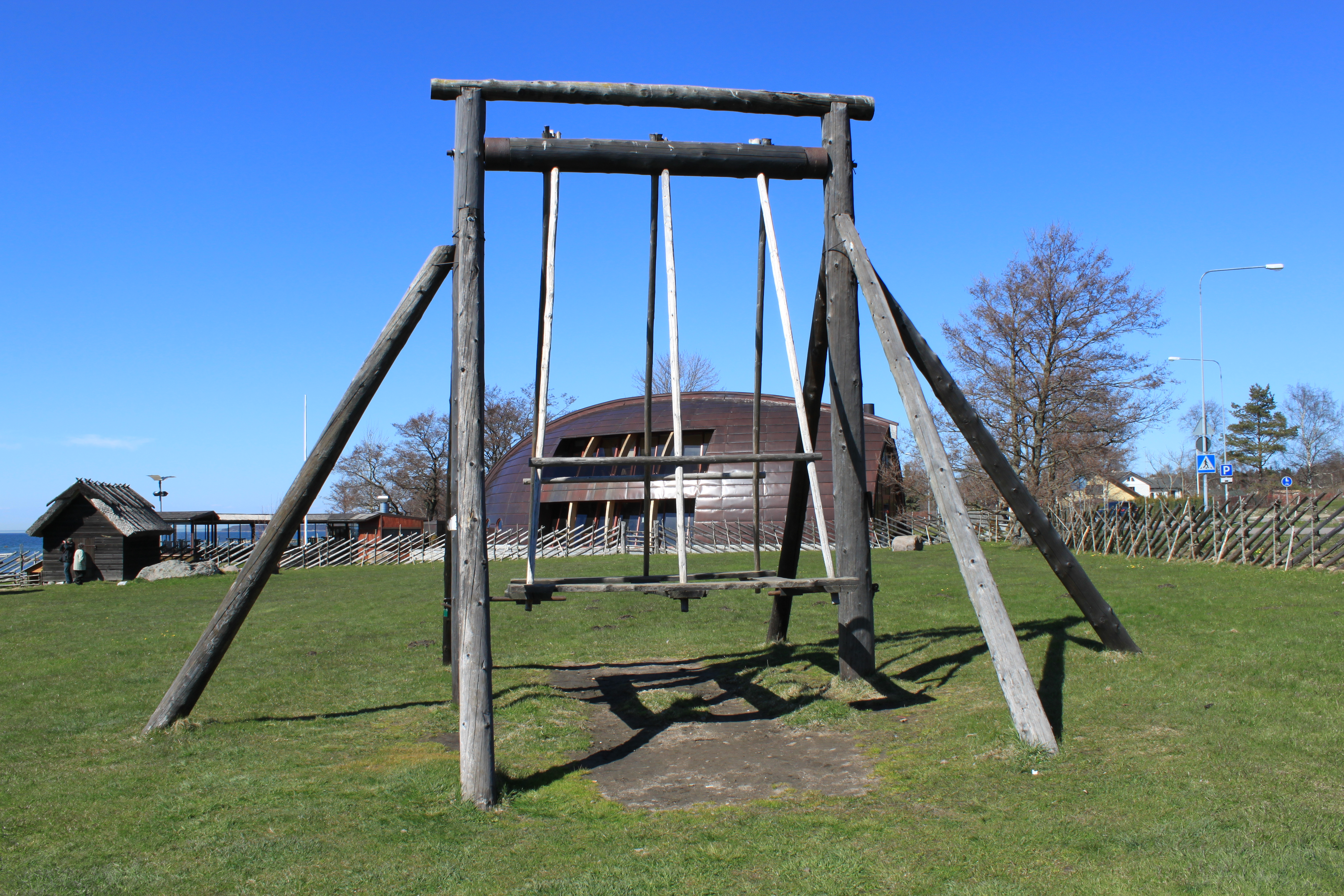 В Виймсиском Музее под открытым небом